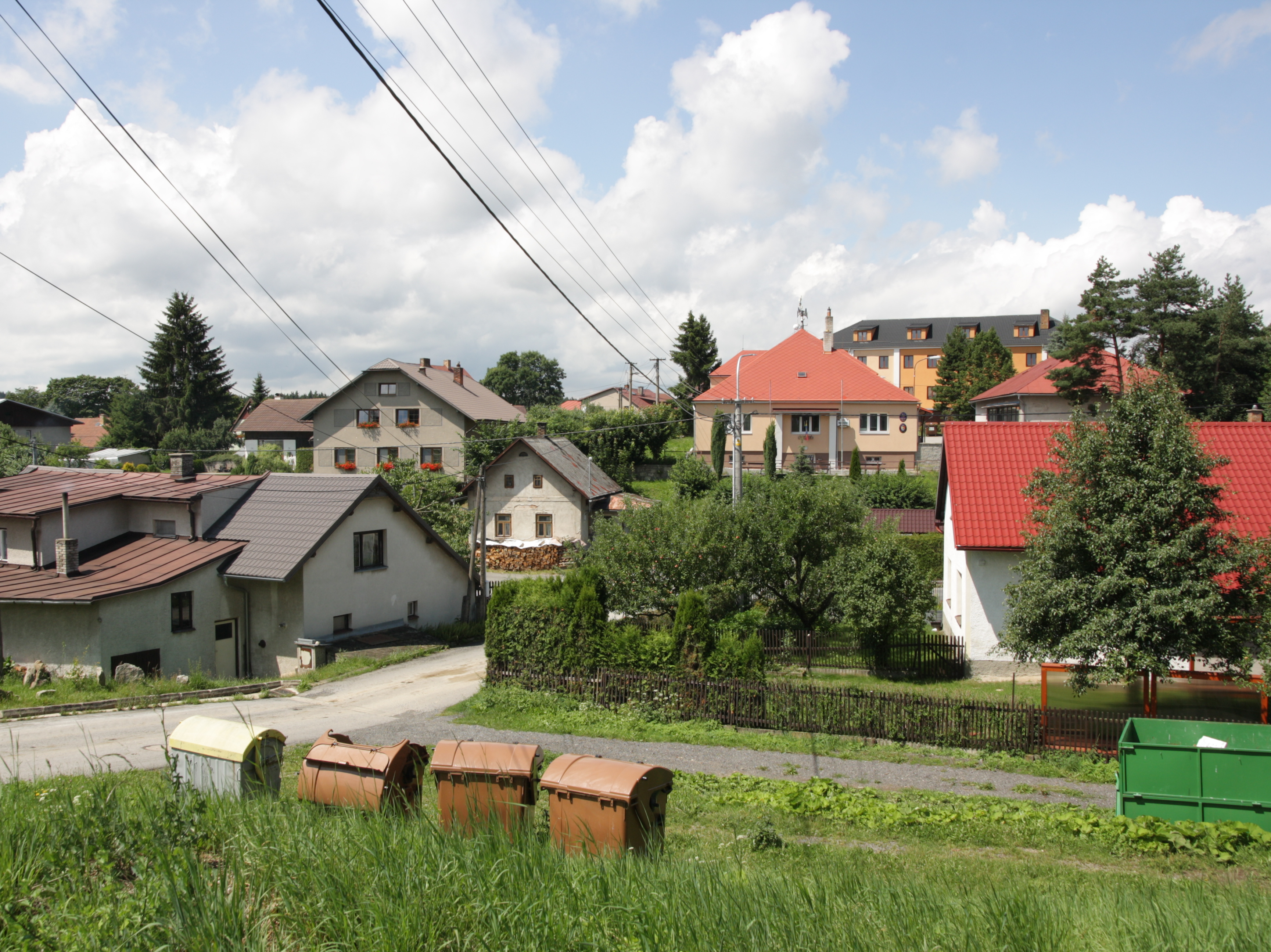 Světnov - centrum obce, pohled od jihovýchodu.